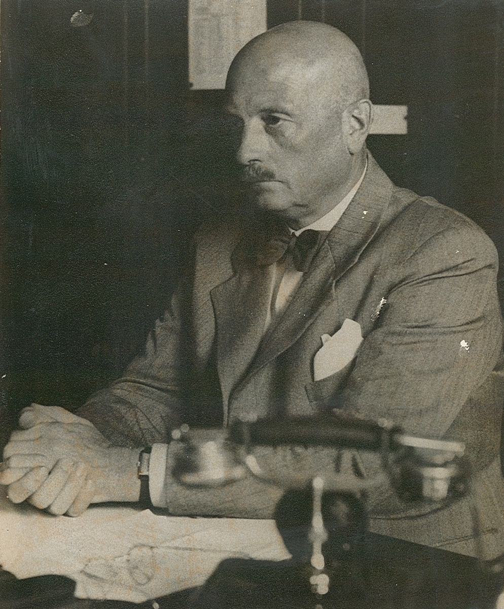 Kristian Welhaven, Oslos politimester i 27 år fra 1927 til 1954.